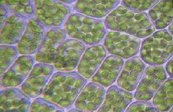 Lichtmikroskopische Aufnahme von Chloroplasten